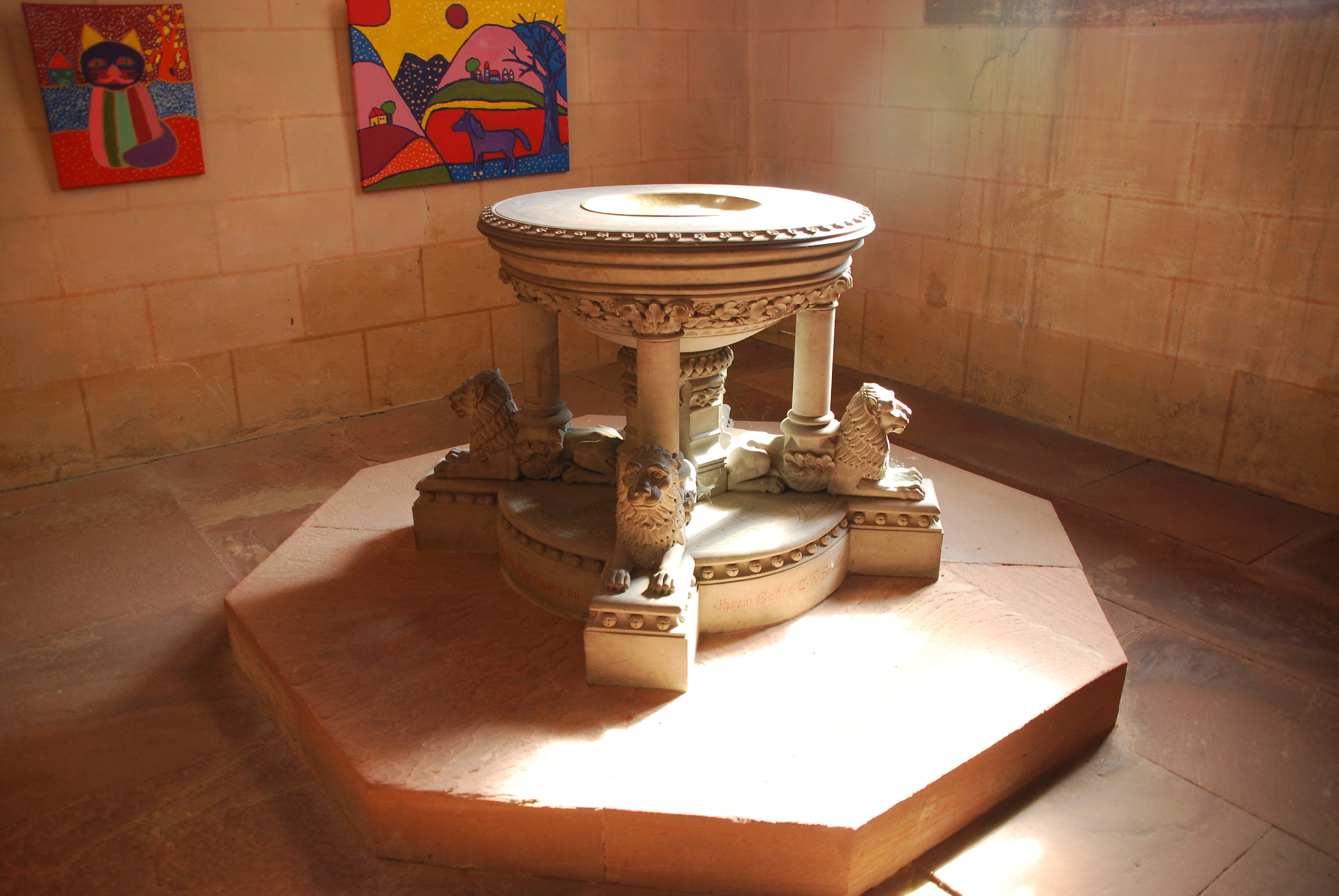 Taufstein im südlichen Seitenschiff, Marienkirche in Gelnhausen